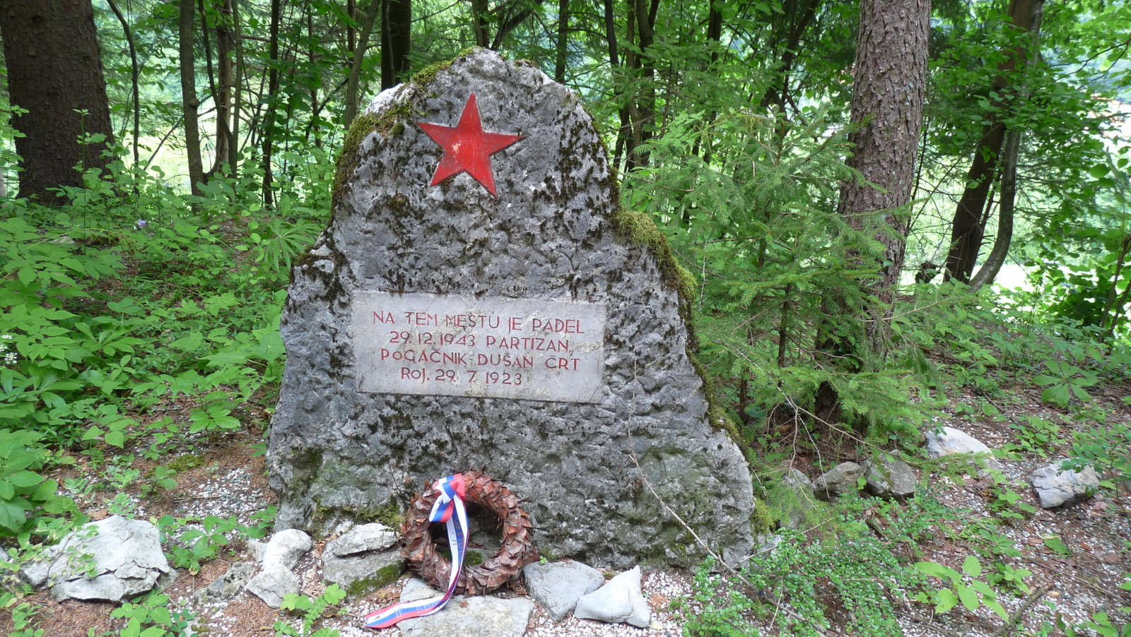 Spomenik Dušanu Pogačniku Črtu nad Kropo